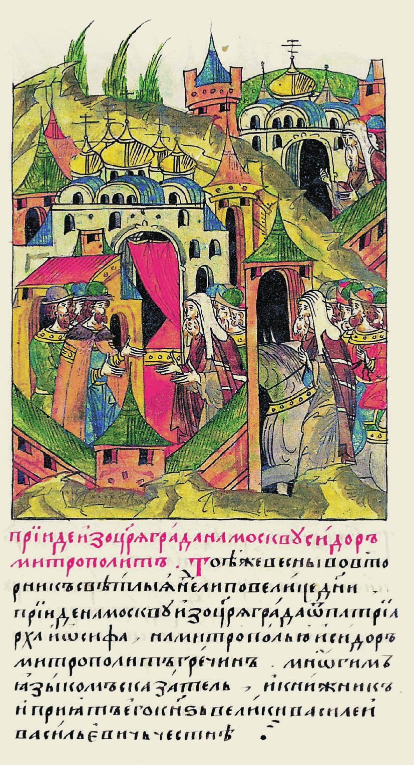 Пришел из Царьграда в Москву митрополит Исидор. В ту же весну во вторник Светлой недели после Велико- го дня прибыл в Мо- скву из Царьграда от патриарха Иосифа на митрополию митро- полит Исидор, грек, знаток многих языков и книжник; и принял его великий князь Василий Васильевич с почестями.